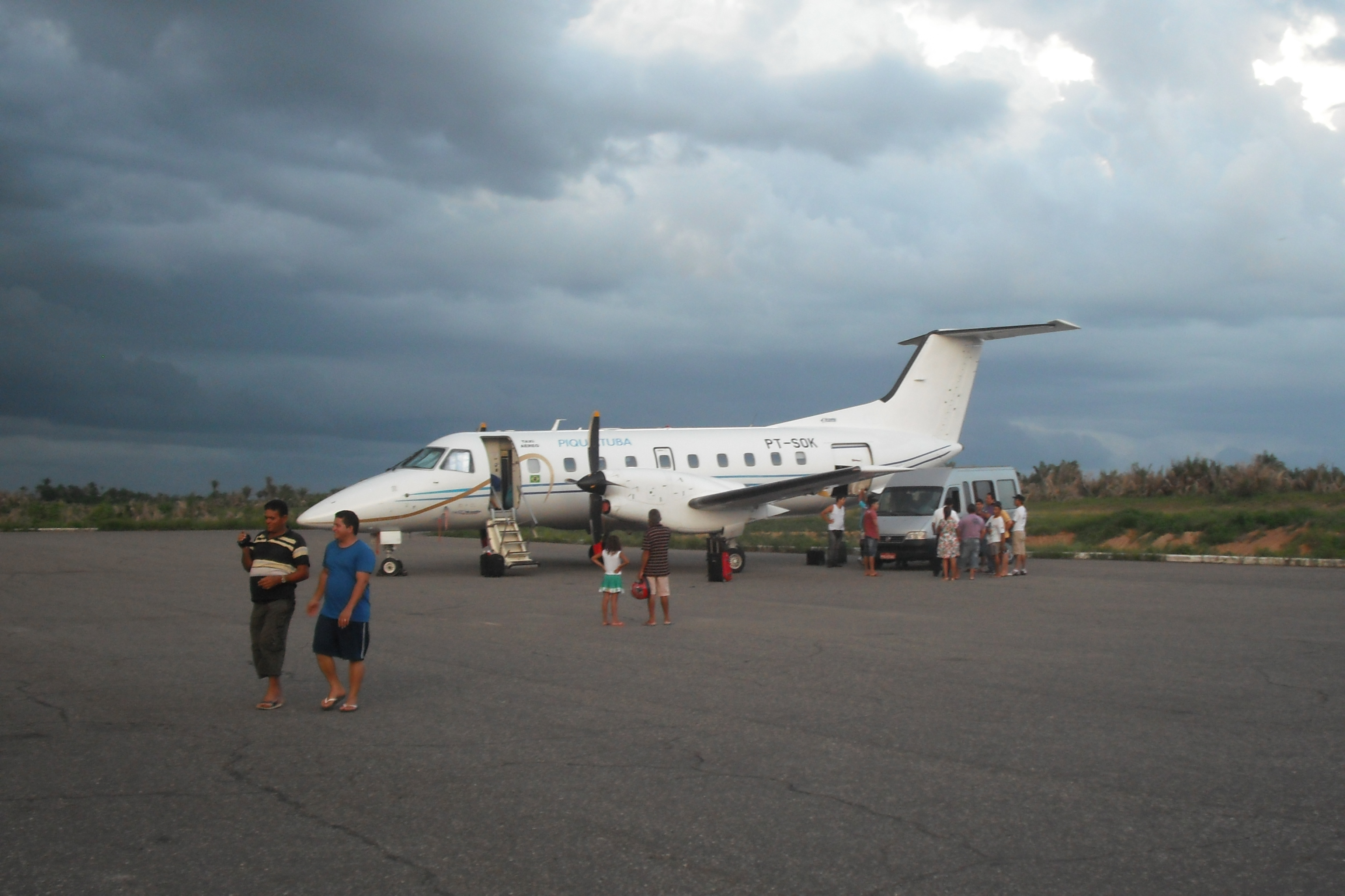 EMB120 estacionado no Aeroporto Regional de Santa Inês - MA